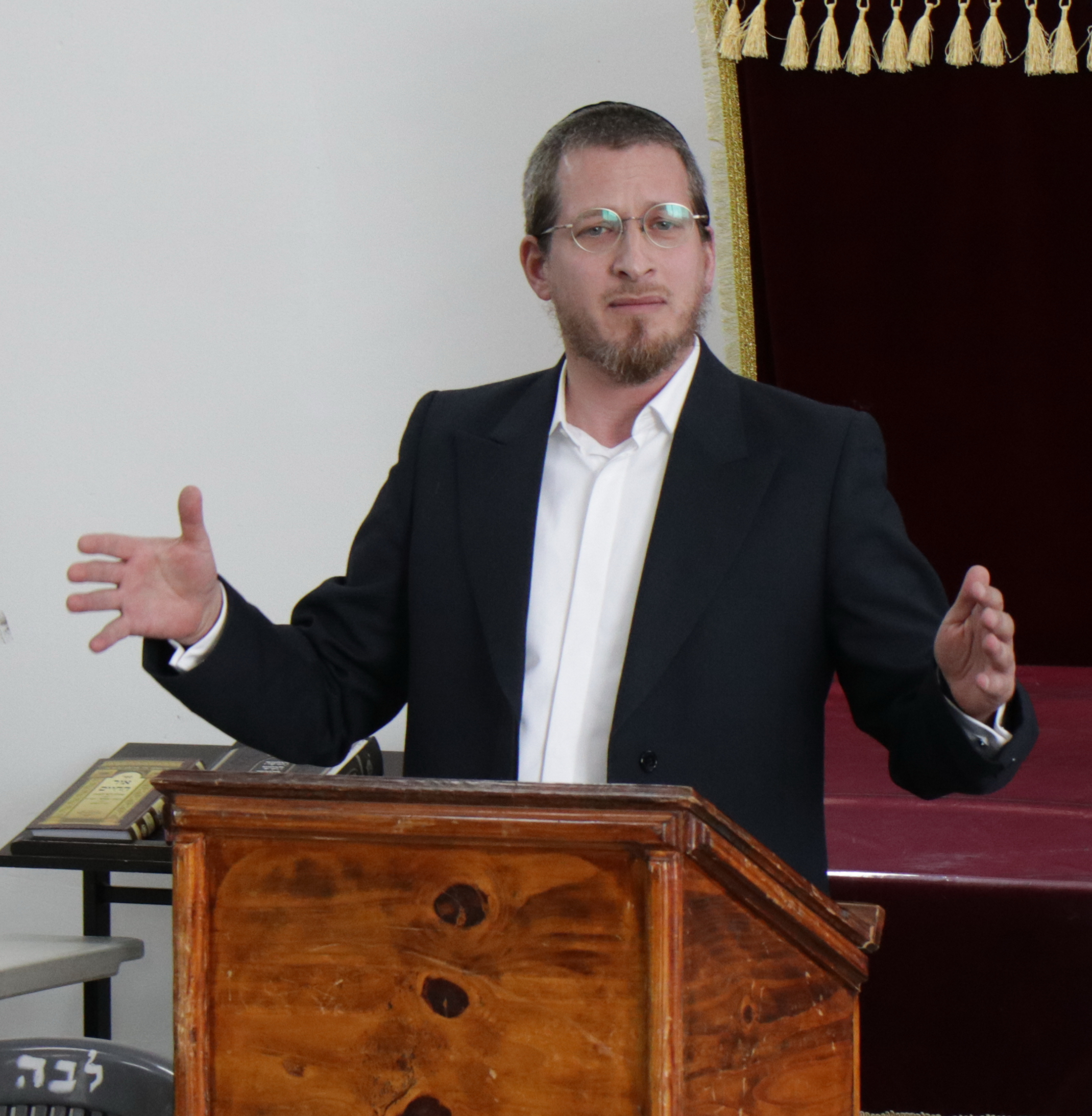 הרב מנחם בומבך, בית שמש, אוגוסט 2018